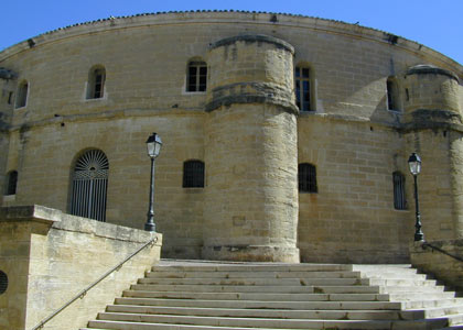 Le couvent des Ursulines (Agora de la danse) à Montpellier Image perso